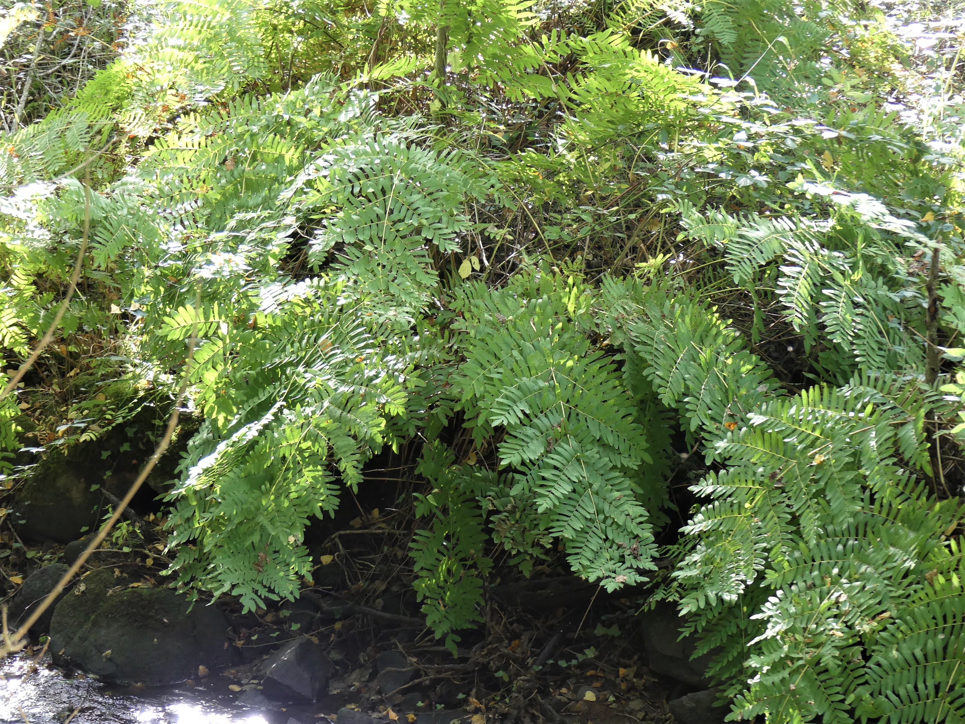 Osmonde royale (Osmunda regalis) au bord du Bandiat, Abjat-sur-Bandiat, Dordogne, France.